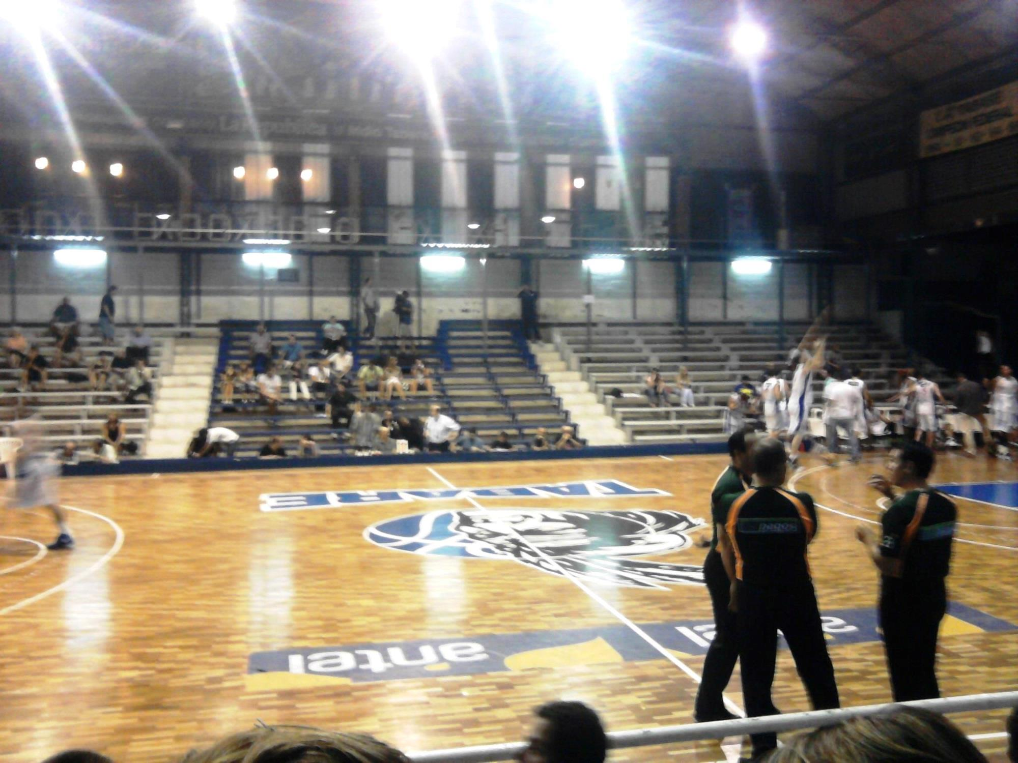 Partido de Tabaré en su cancha, correspondiente a la Liga Uruguaya de Básquetbol 2012-13. Foto tomada desde un teléfono móvil.